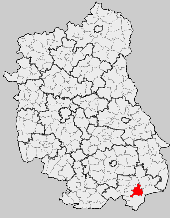 Map of gmina Jarczów, Tomaszów Lubelski county, Lublin voivodship Mapa gminy Jarczów, powiat tomaszowski, województwo lubelskie